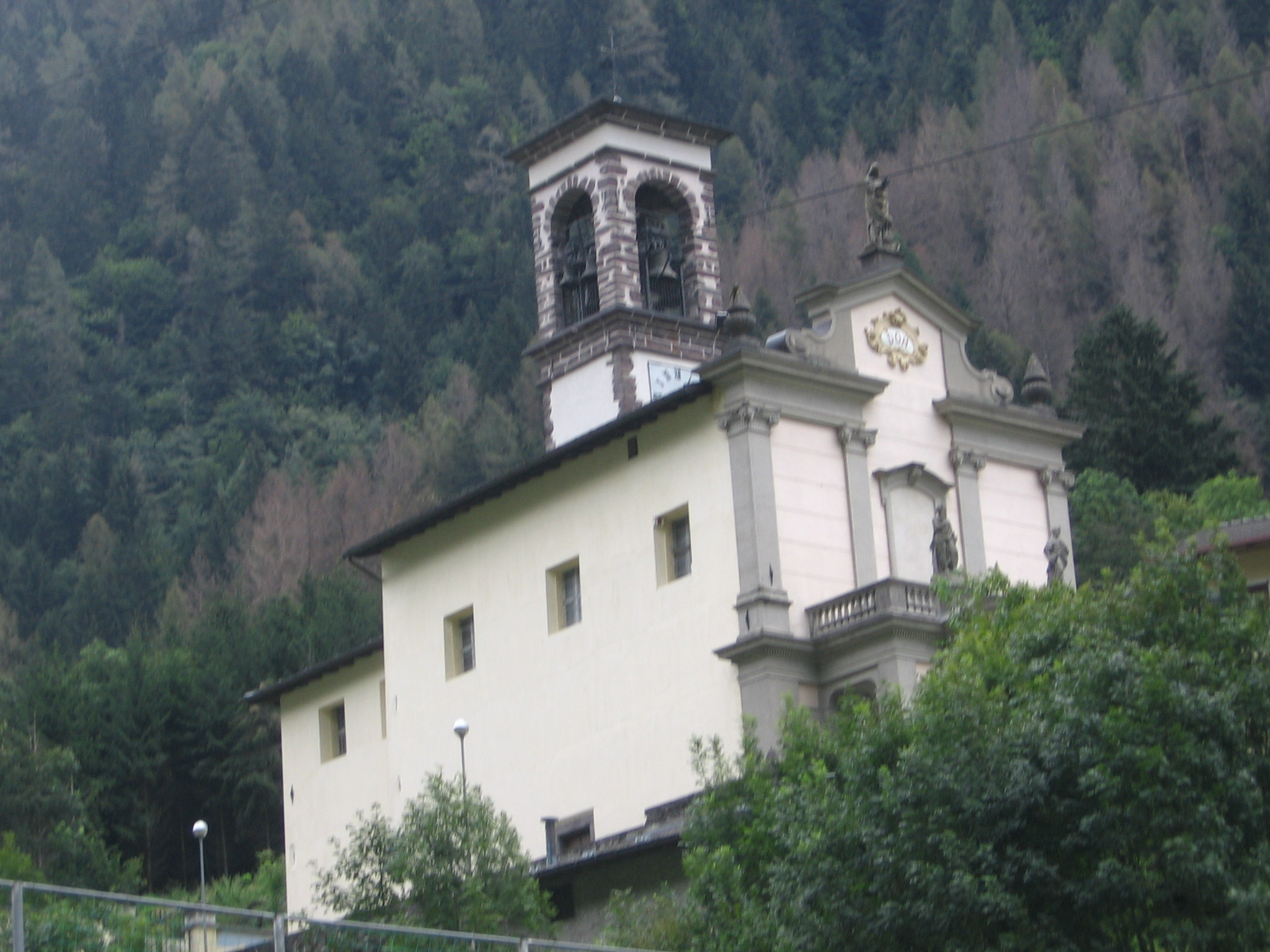 Isola di Fondra, Bergamo, Italy